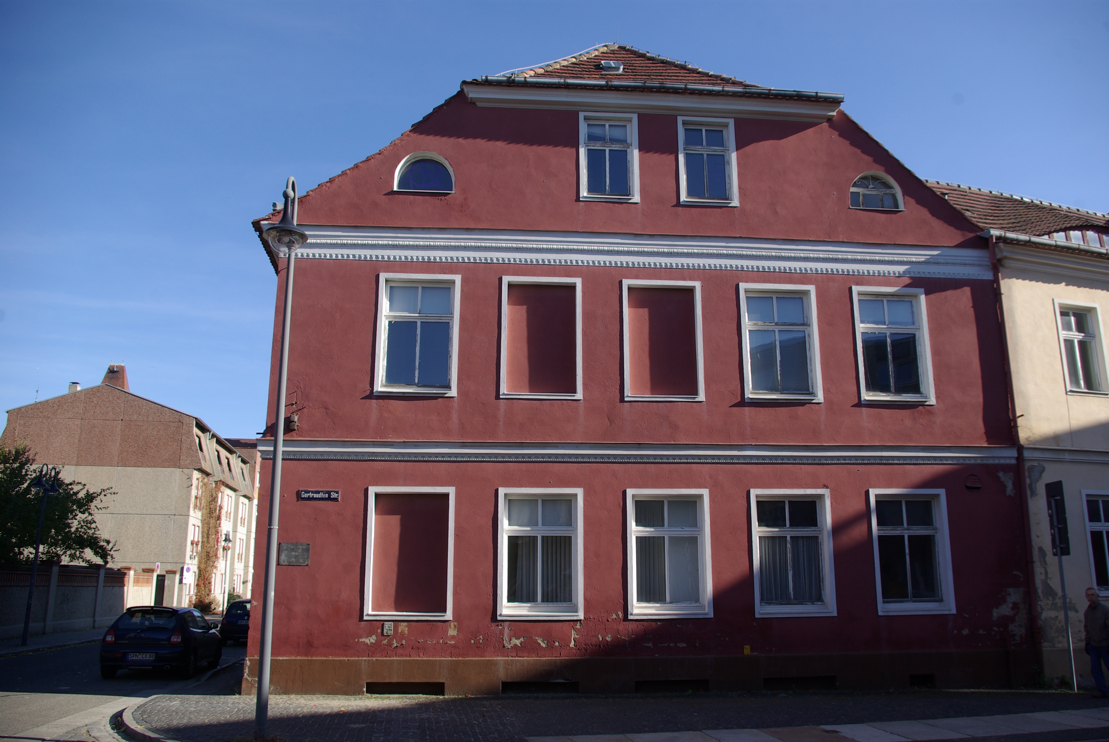 Cottbus in Brandenburg. Das wichernhaus in der Mühlenstraße 30/31 steht unter Denkmalschutz. Der Blick ist von Gertrautenstraßen auf das Haus.